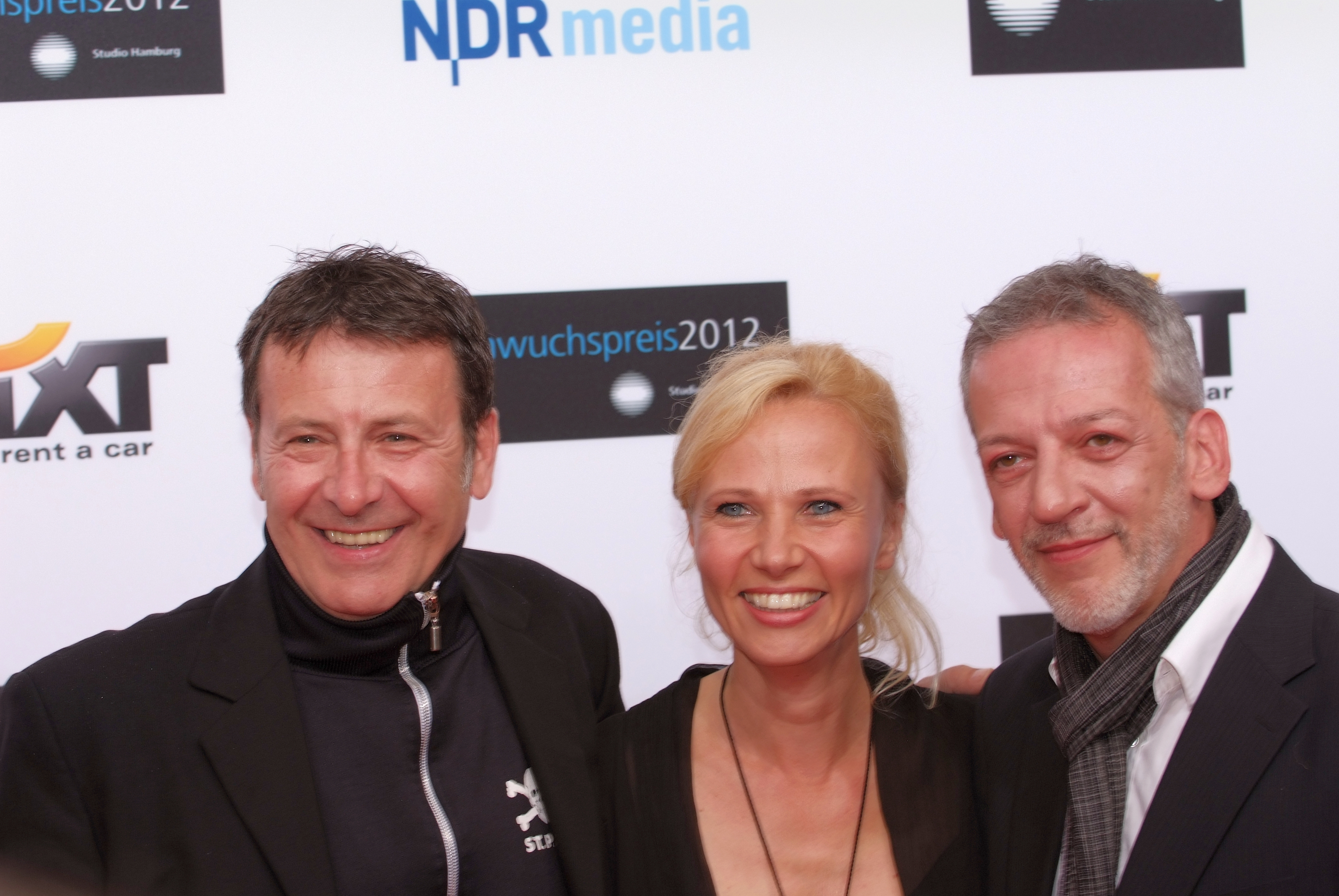 v.l.n.r.: Hermann Toelcke, Bettina Ratschew und Stefan Hossfeld beim Studio Hamburg Nachwuchspreis 2012